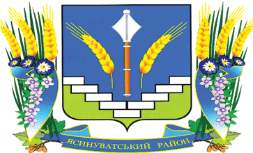 Герб_Ясинуватського_району